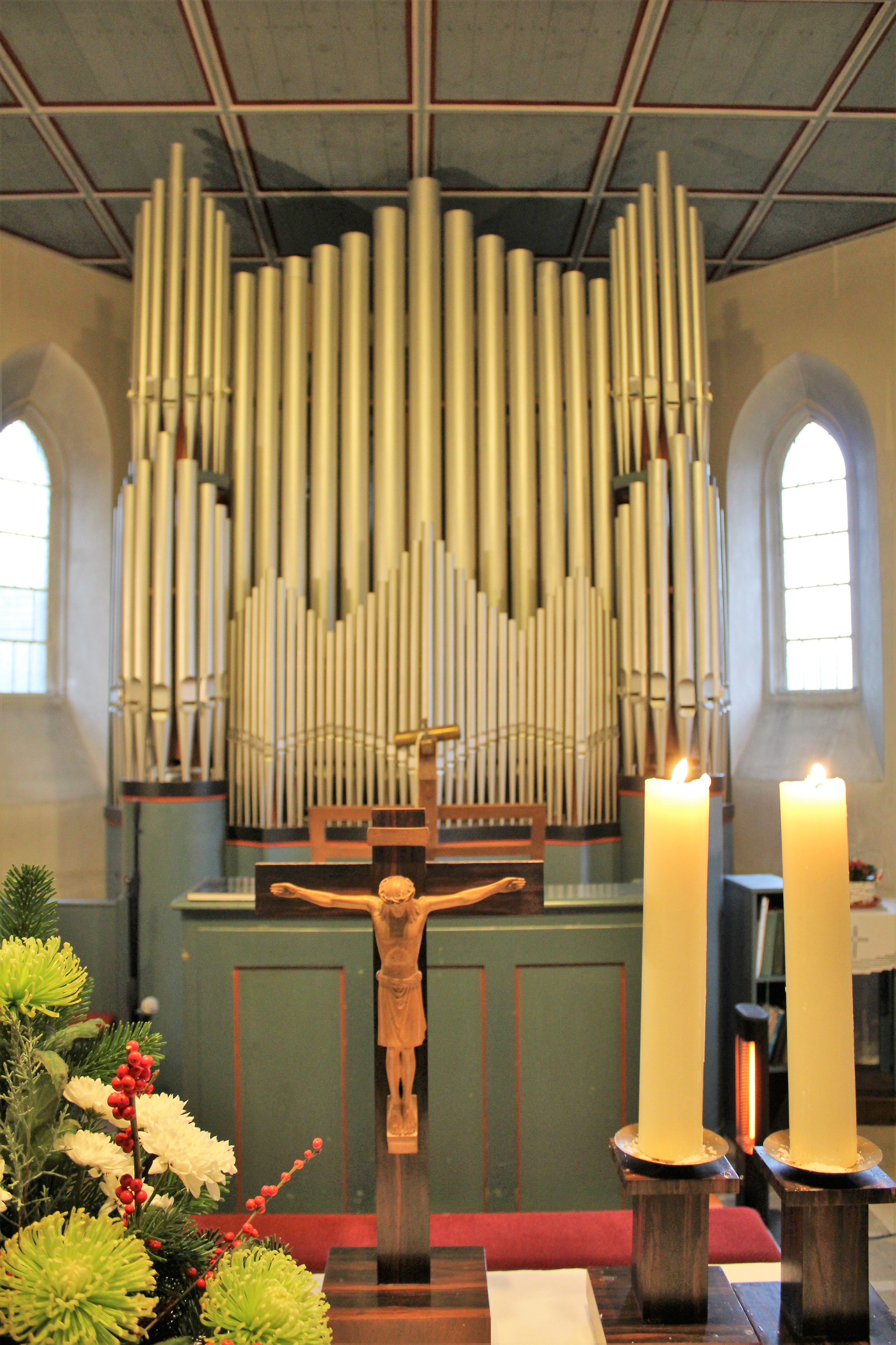 Evangelische Kirche Flensungen, Gemeinde Mücke, Vogelsbergkreis, Hessen, Deutschland